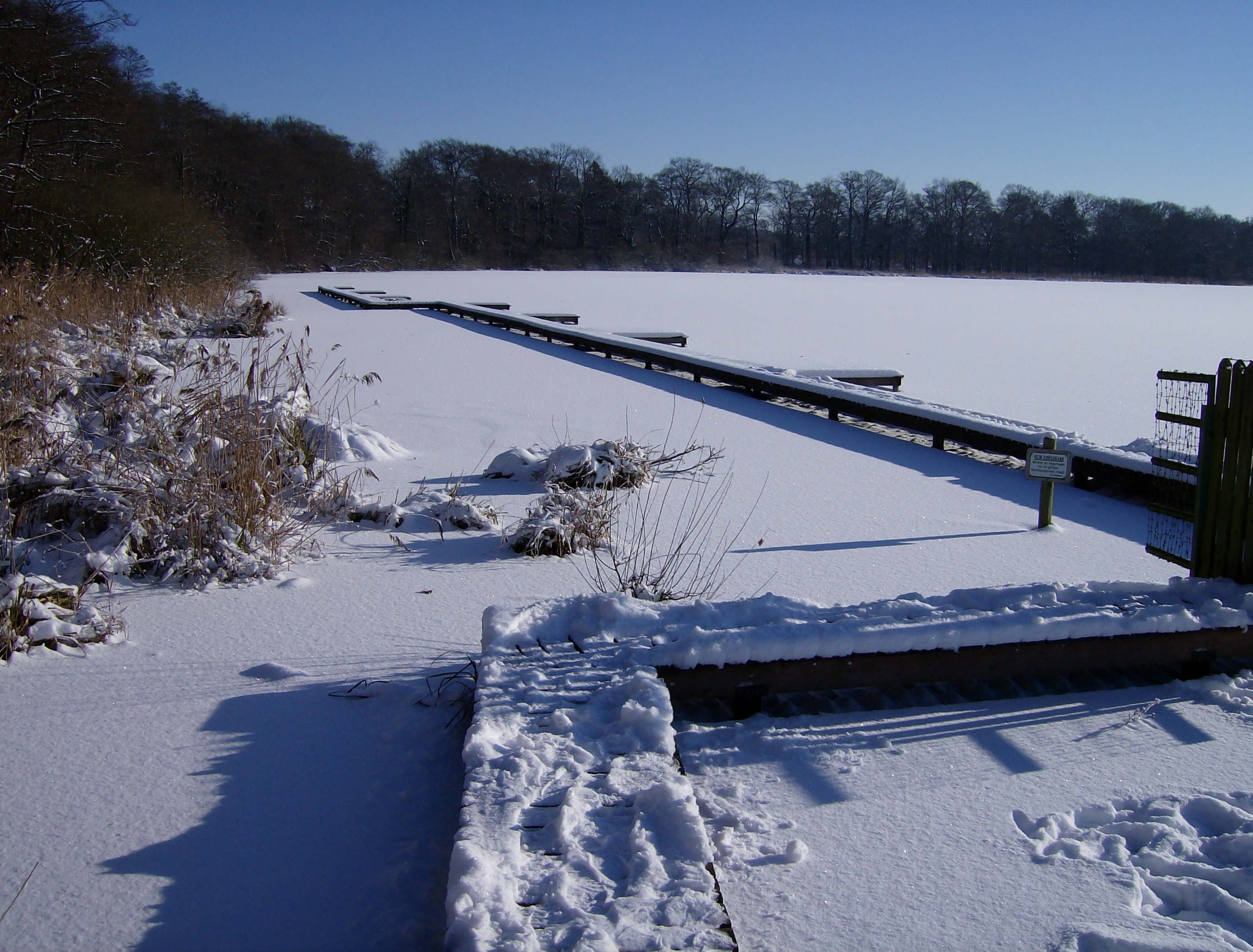 Ein Steg an den Krickenbecker Seen im Winter.